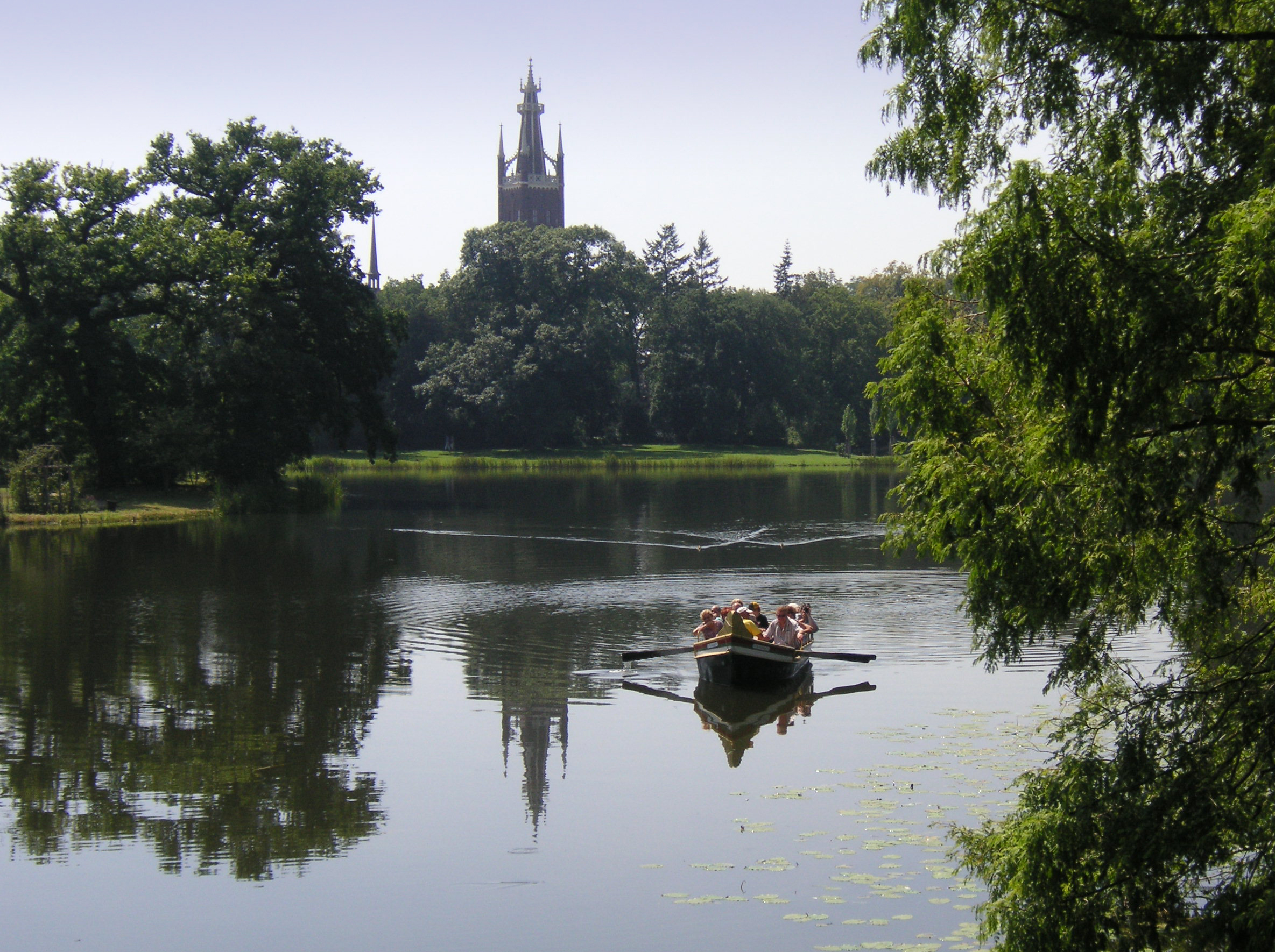 Wörlitz Lake and Church St.Petri in Wörlitz near Dessau, Germany